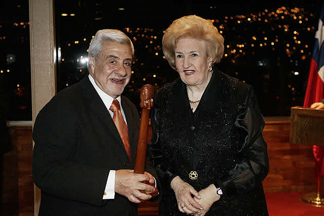 Julio Jung en representación de Nelson Villagra, recibe el Reconocimiento a la Trayectoria de parte de Eugenia Garrido, Presidenta Consejo Asesor FIC Viña